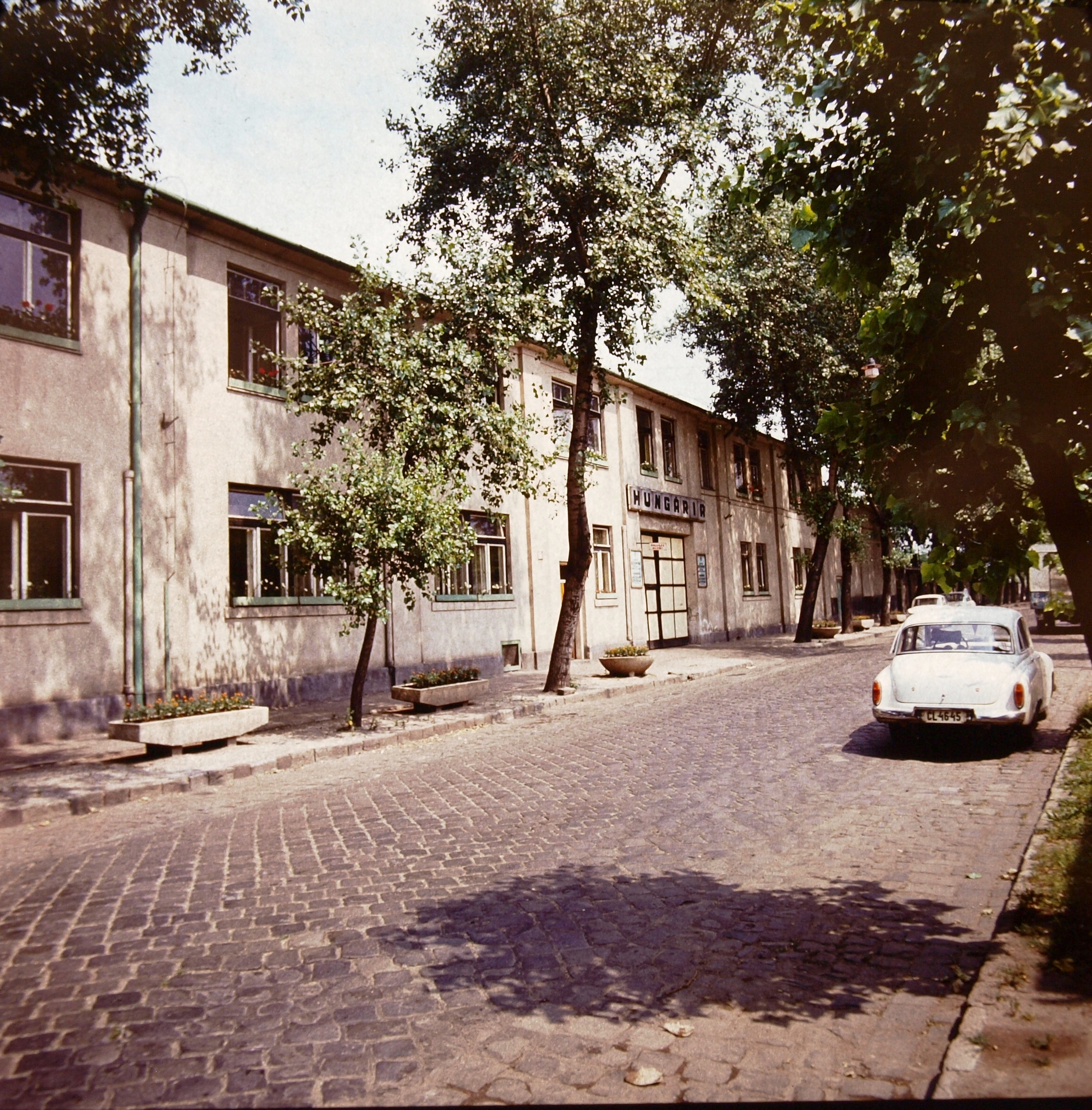 A Hungária-Jacquard Szövőgyár telephelye. - Szaküzlete volt: Budapest XIX., Szaiay u. 14., ? Forrás: [1]